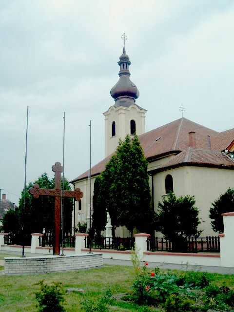 Kisboldogasszony római katolikus templom, Pecöl